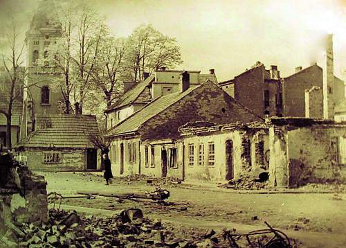 Rudza w Żywcu podczas działań wojennych